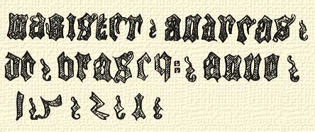 Felirat a brassói Szent Márton-templom harangján